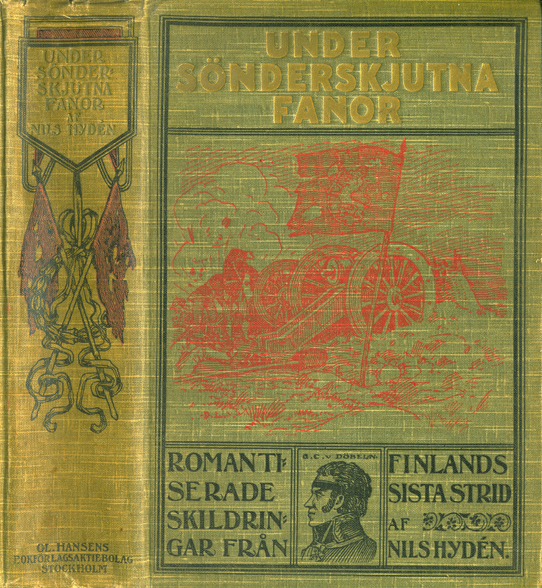 Cover of the book Under sönderskjutana fanor av Nils Hydén